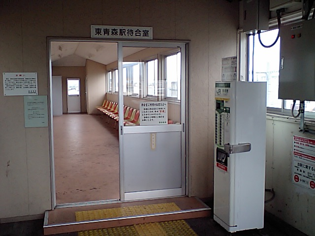 東青森駅 待合室